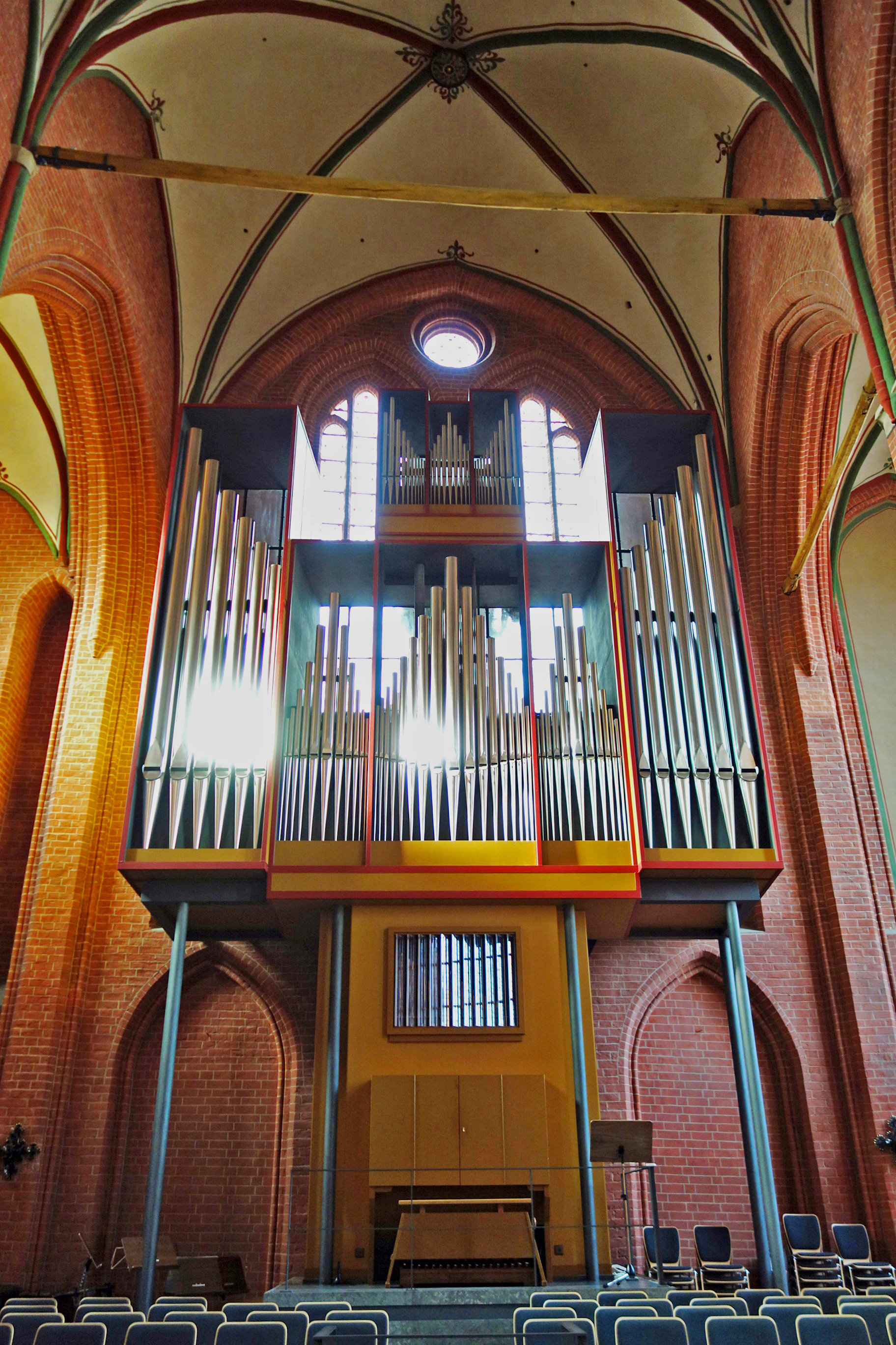 Orgel Kloster zum Heiligen Kreuz, Rostock, Mecklenbrg-Vorpommern, Deutschland